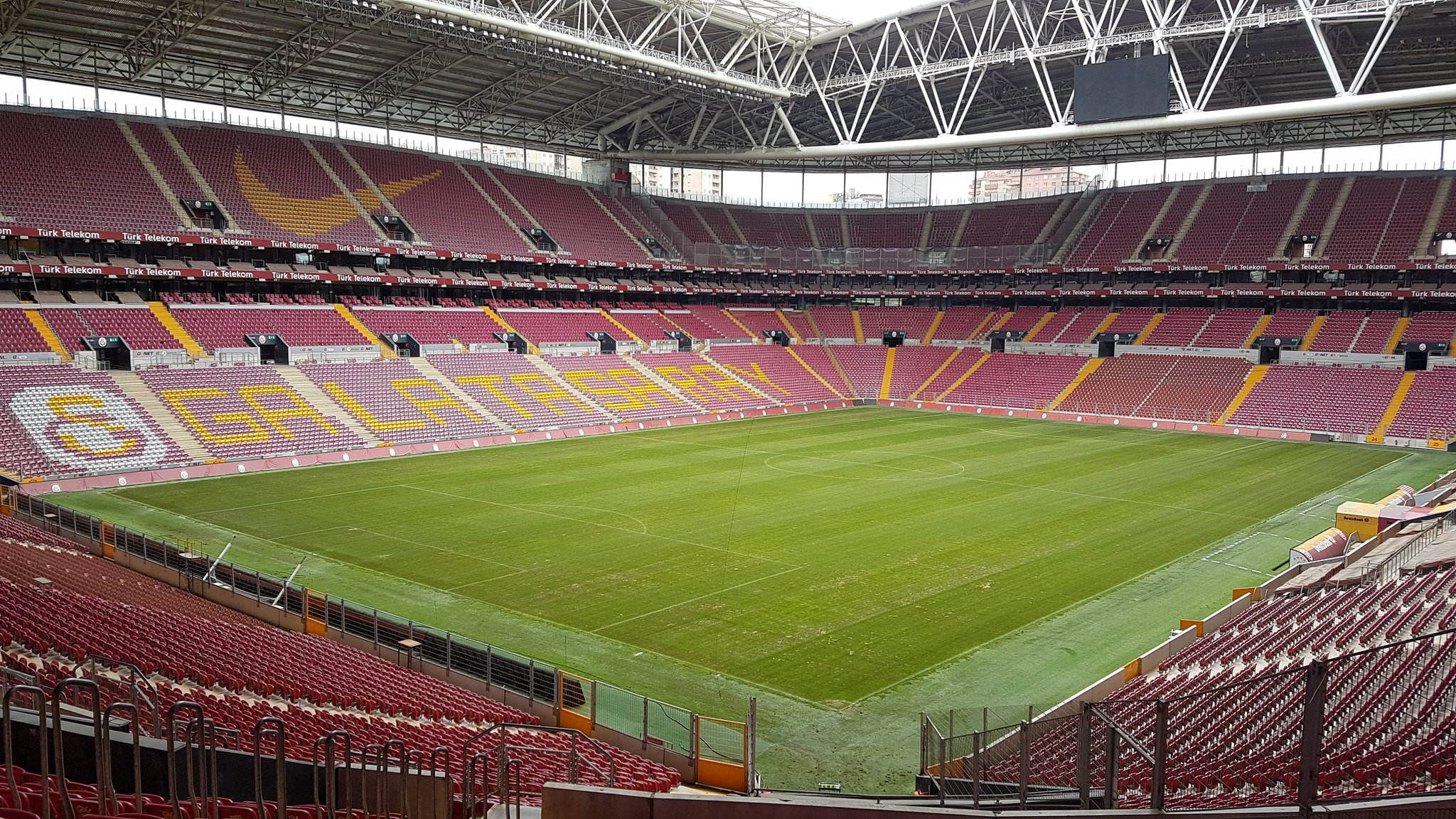 Galatasaray Arena_North-West Corner